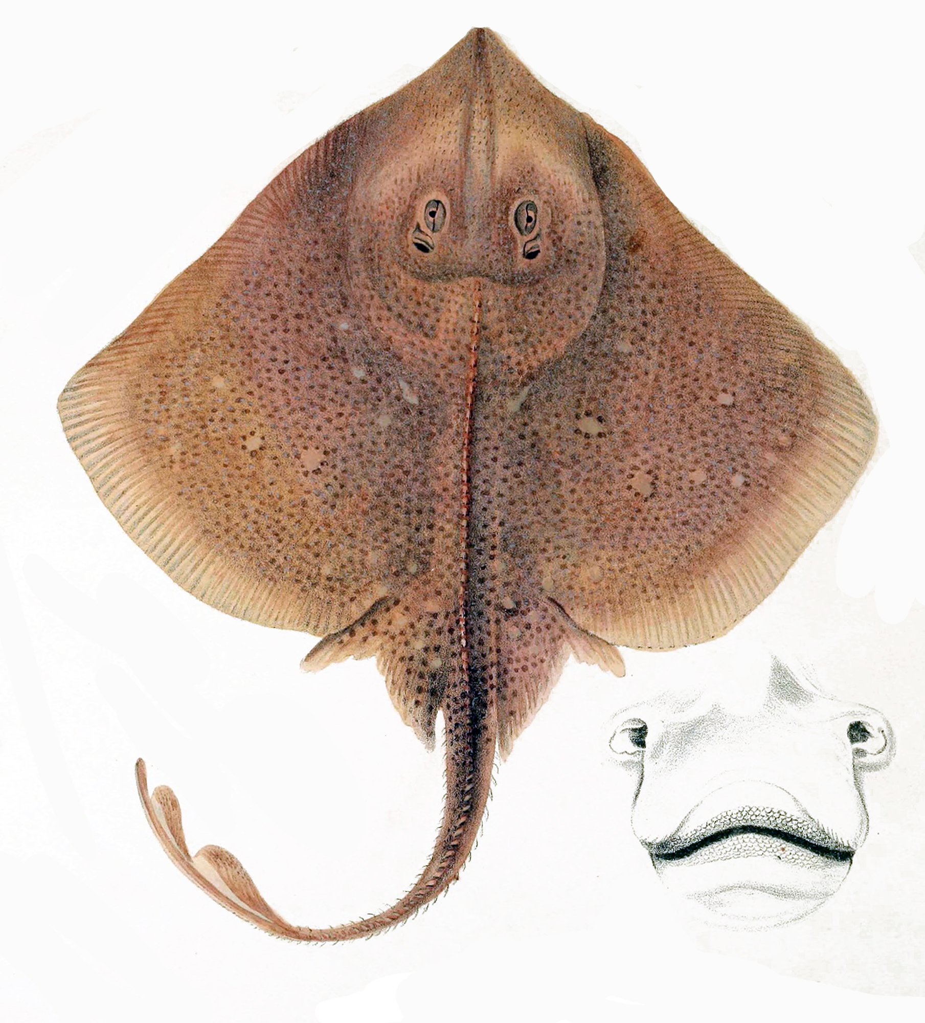 Raja asterias